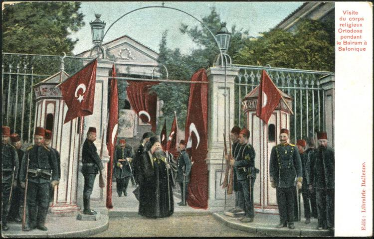 Посещение на солунския митрополит по време на байрама.